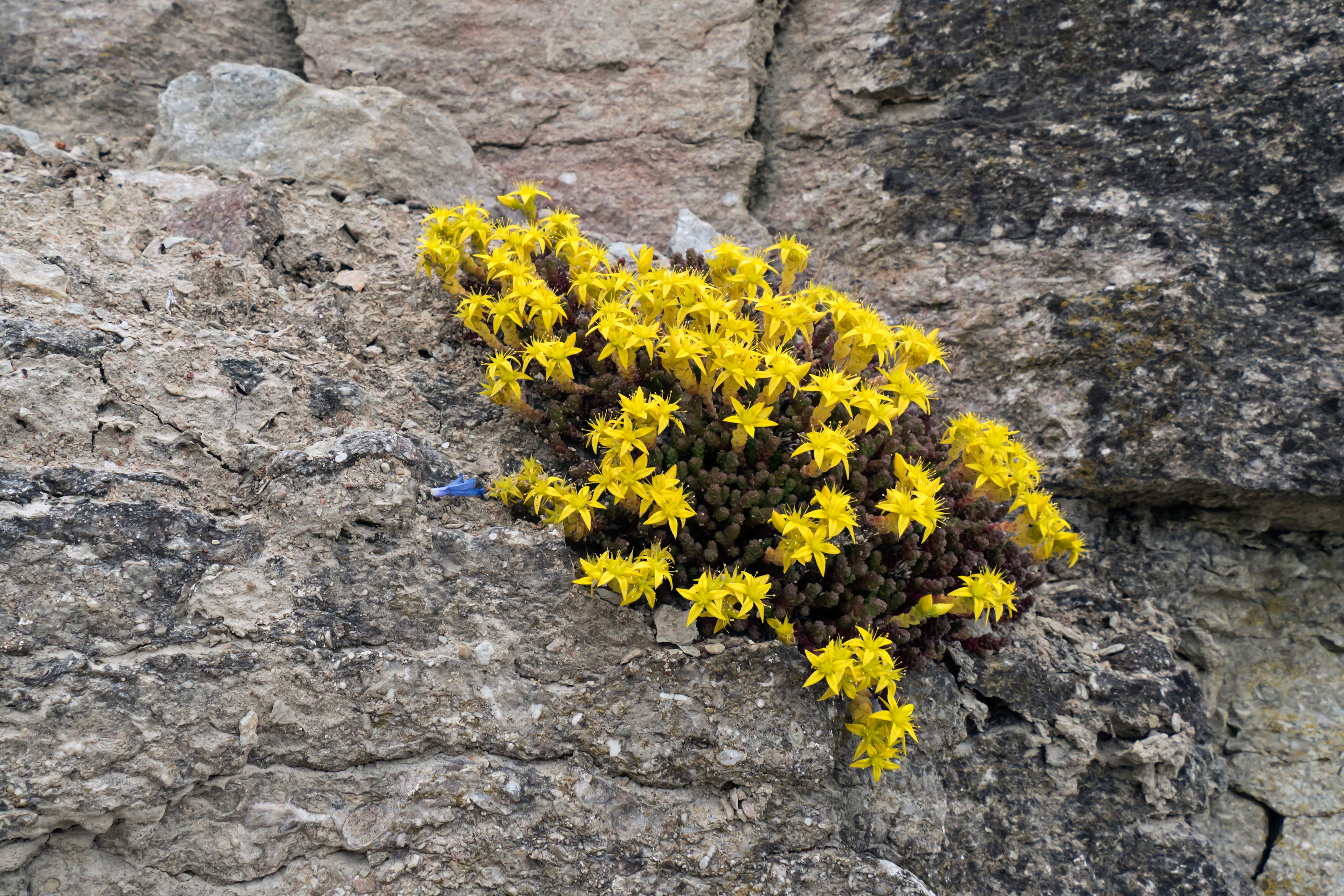 Harilik kukehari, Sedum acre